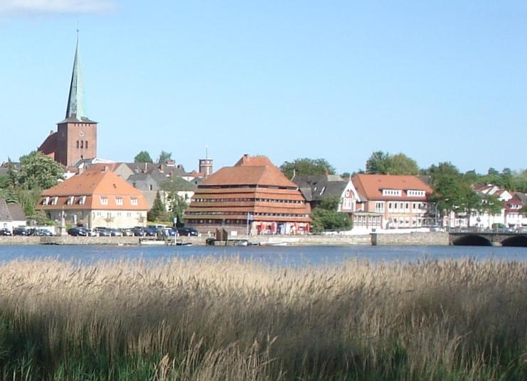 Der Pagodenspeicher & die Kirche in Neustadt in Holstein